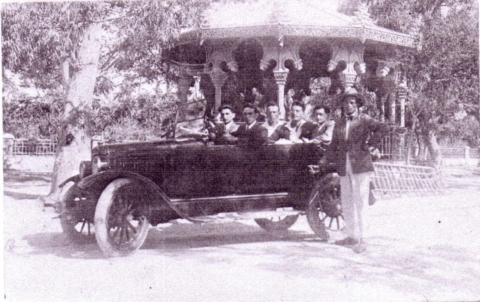 הפביליון - סוכת התזמורת בשדרות ירושלים ביפו - 1925